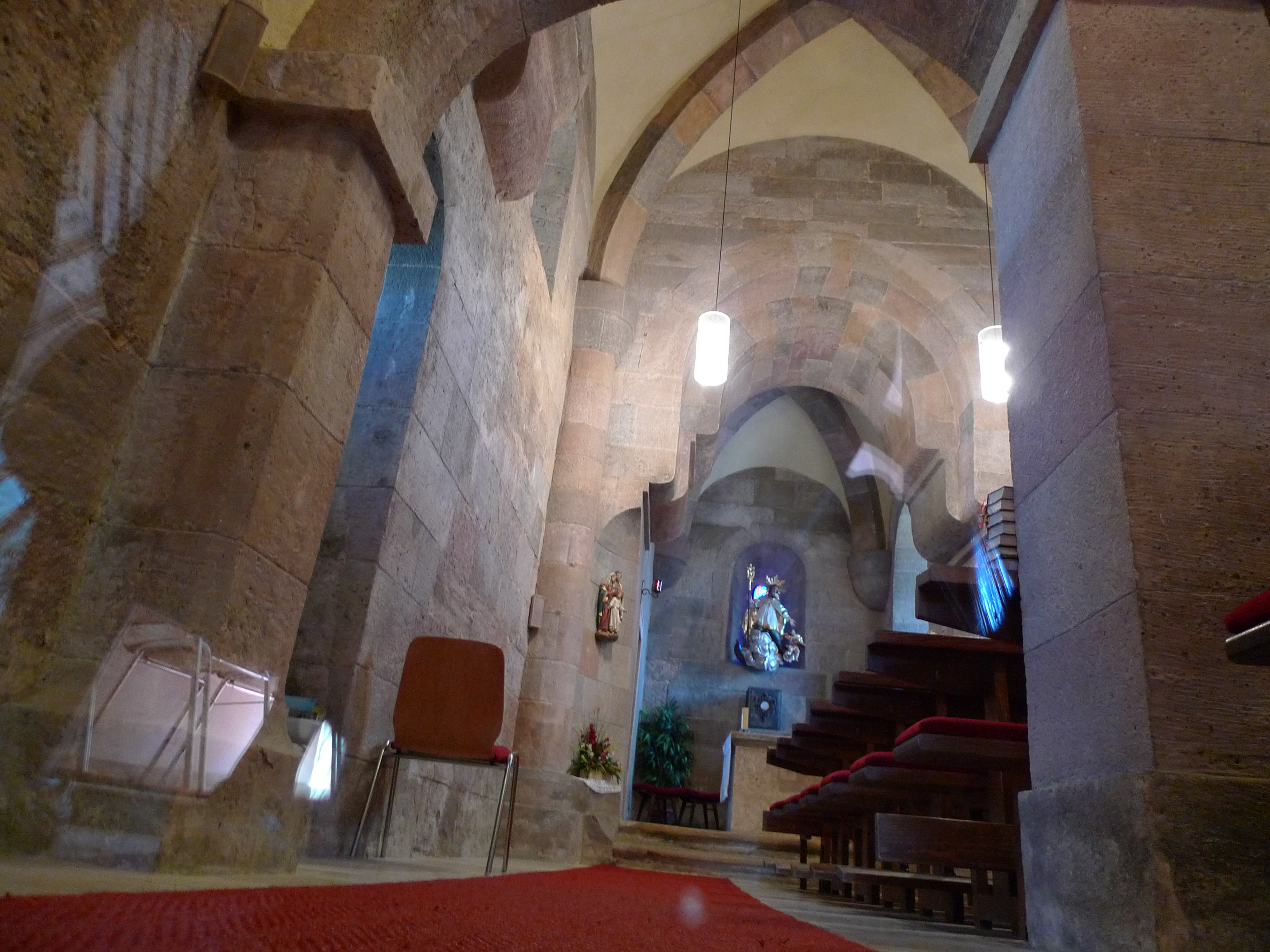 Fk. St. Nikolaus in Wildungsmauer, Innenraum